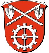 Wappen von Niestetal